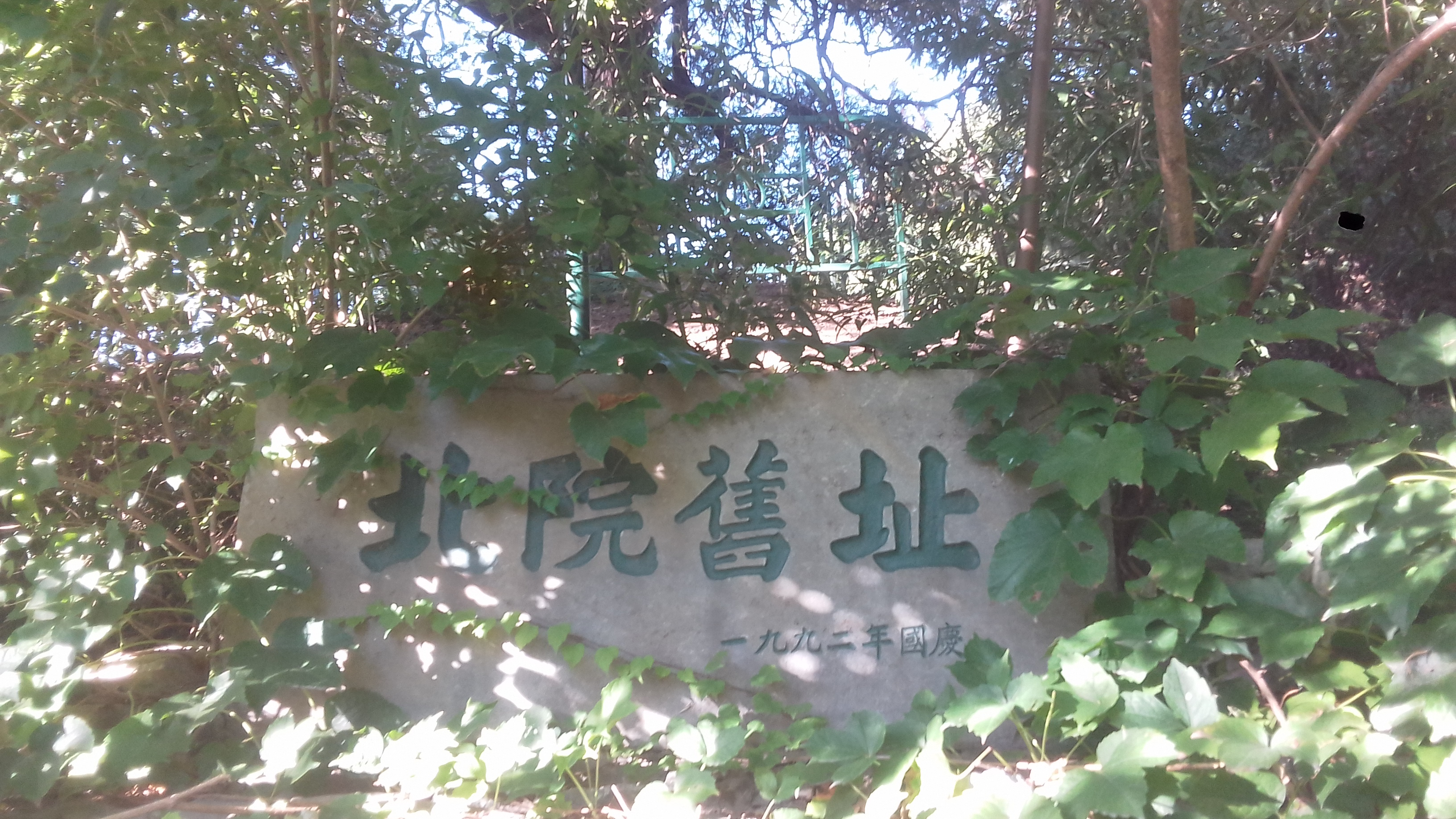 位於清華大學的北院遺址